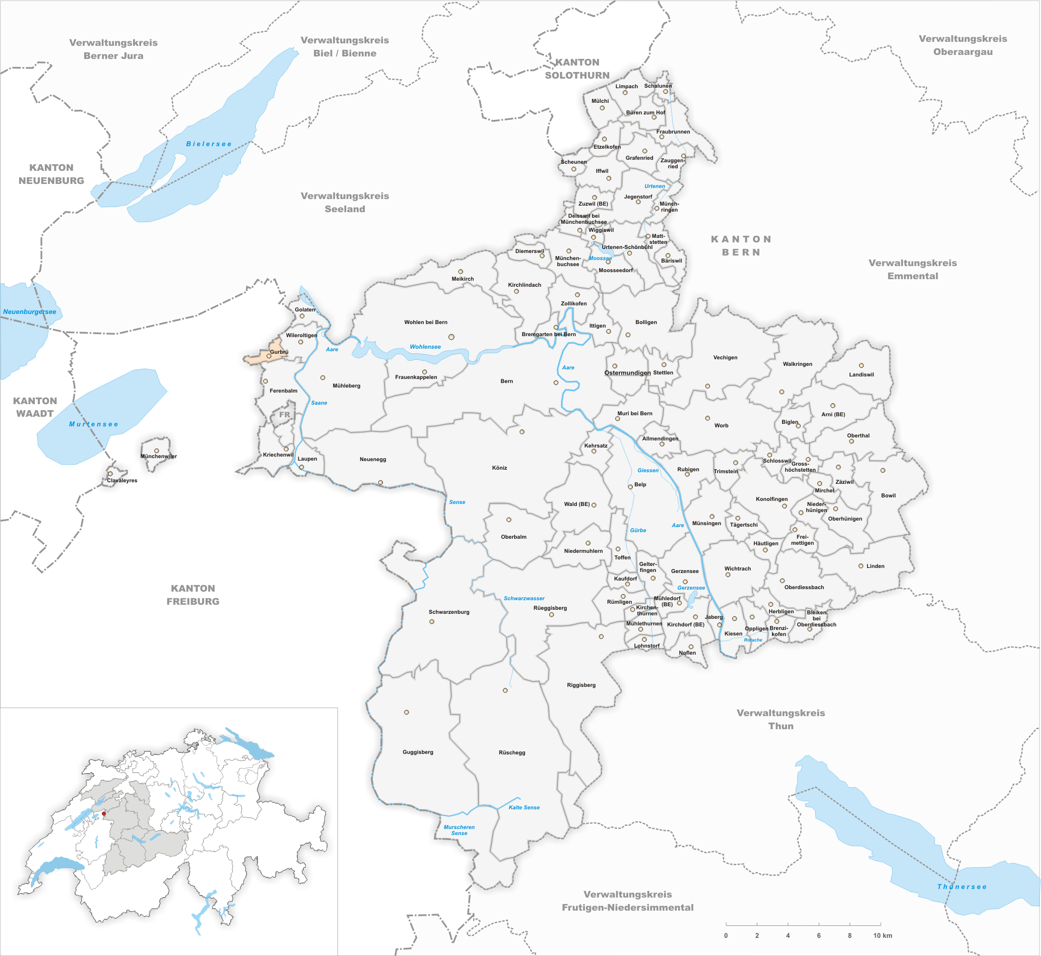 Municipality Gurbrü